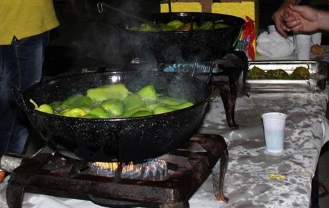 Imaxe de pementos dunha das festas de Freáns. Esta sardiñada con pementos realizase os Xoves as noites.